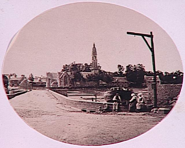 L'église du Faou vers 1857 (photo par Furne Charles Paul [1824-vers 1875], musée d'Orsay)